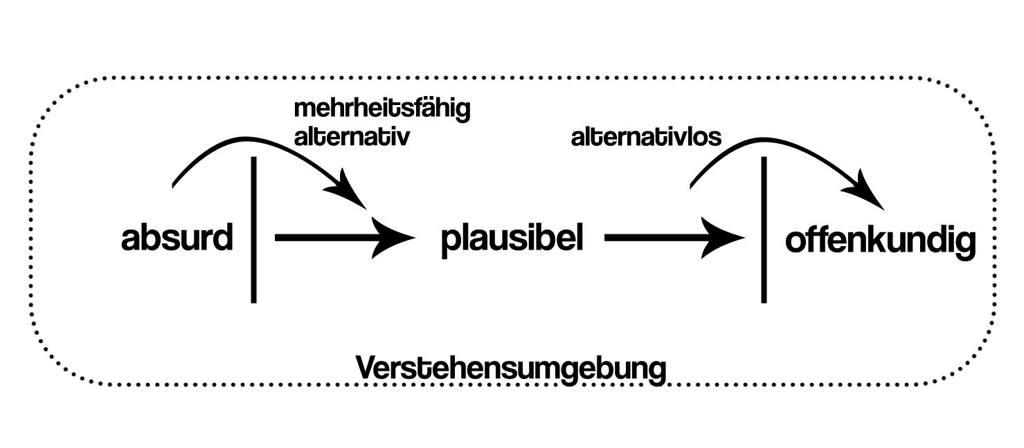 Modellhafte Darstellung der Beziehungen des Begriffs „plausibel“ zu den zentralen, ihn umgebenden Begriffen nach Böhnert/Reszke 2015.